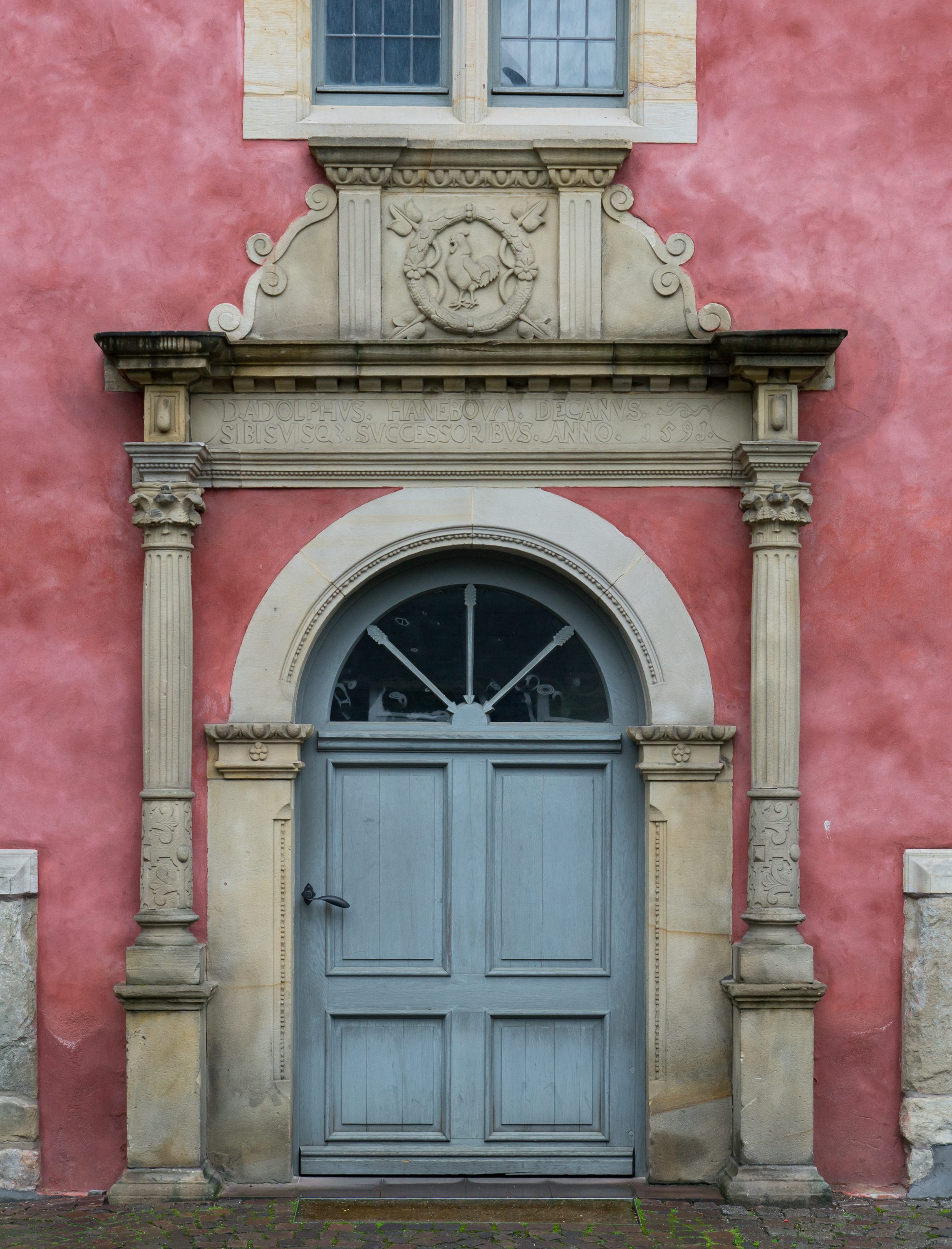 This image shows a heritage building in Germany, located in the North Rhine-Westphalian city Herford (no. 21). Frühherren- bzw. Weddigenhaus in Herford